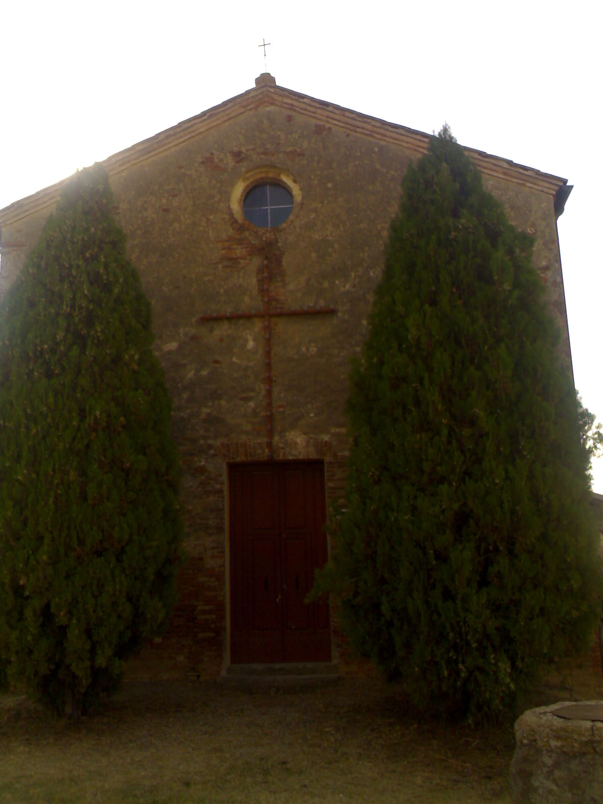 Chiesa della Maestà del Ponte di Montepulciano Stazione (Siena)